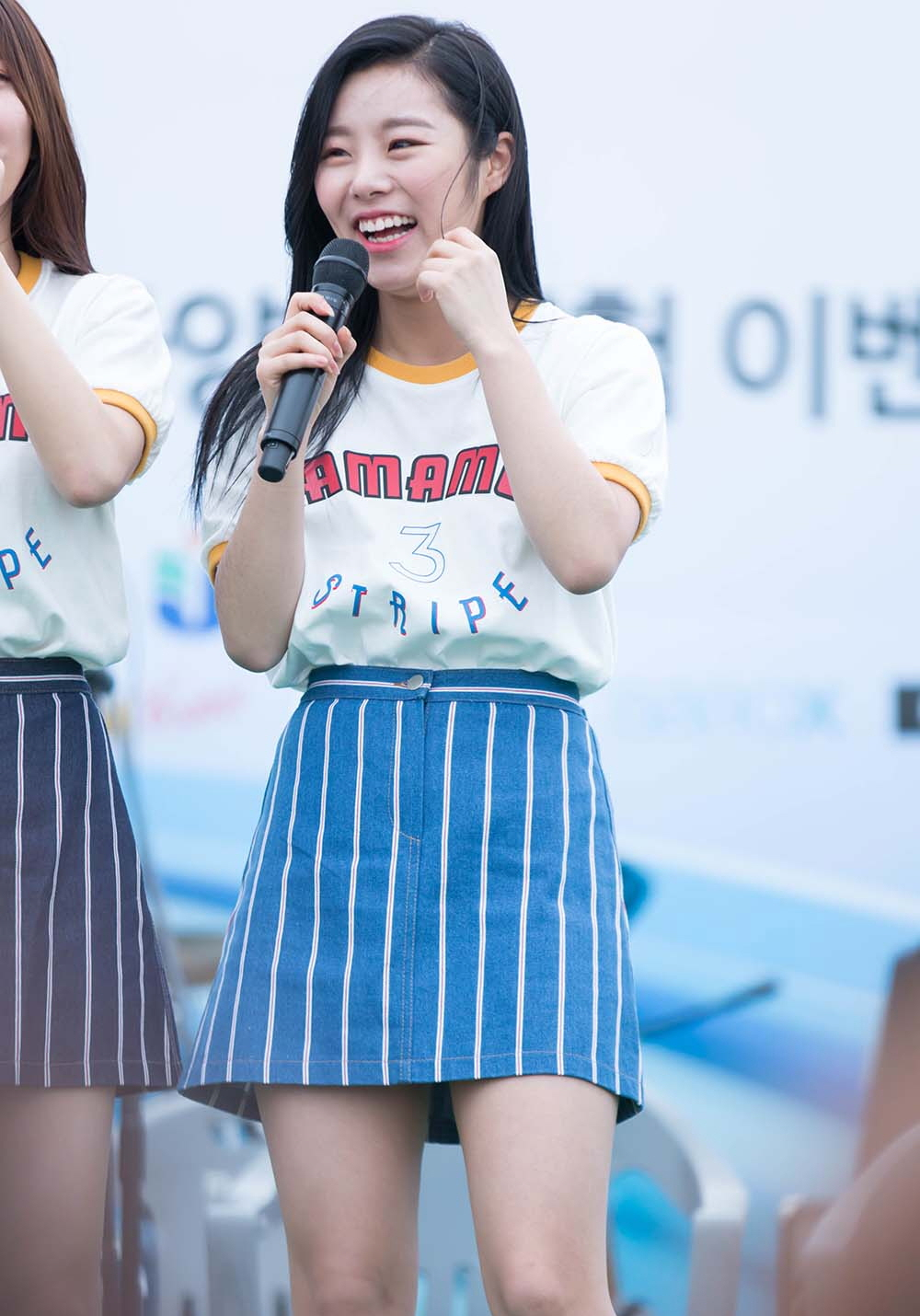 160505 영암 모터&레저 스포츠 한마당 - 휘인 7pic By.Holic